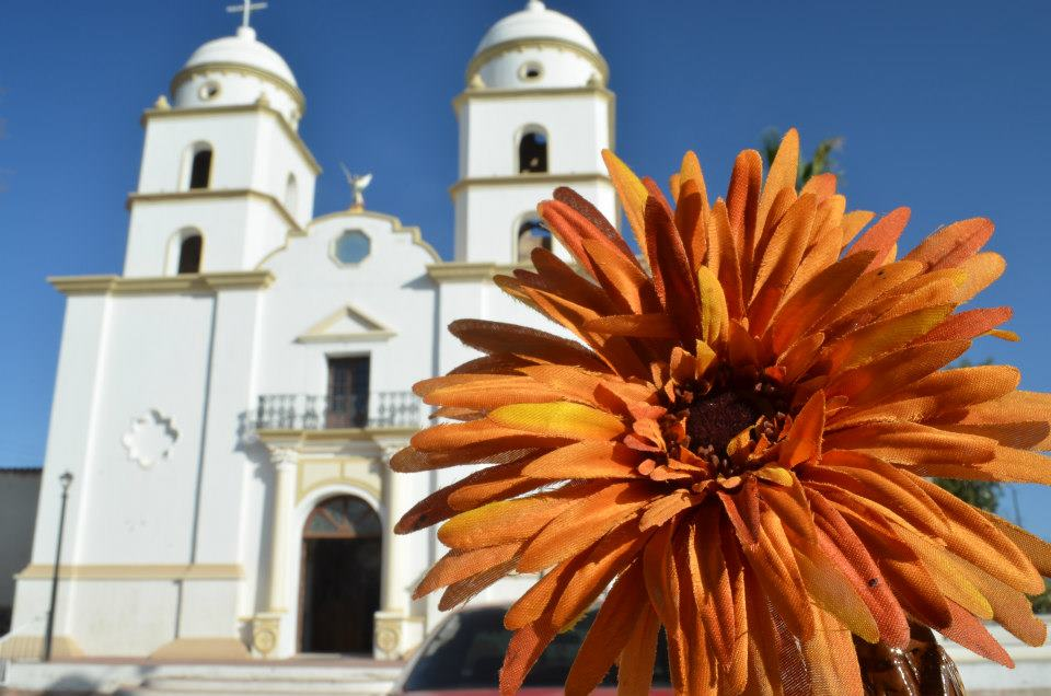 Templo de San Miguel Heróica Ciudad de Ures